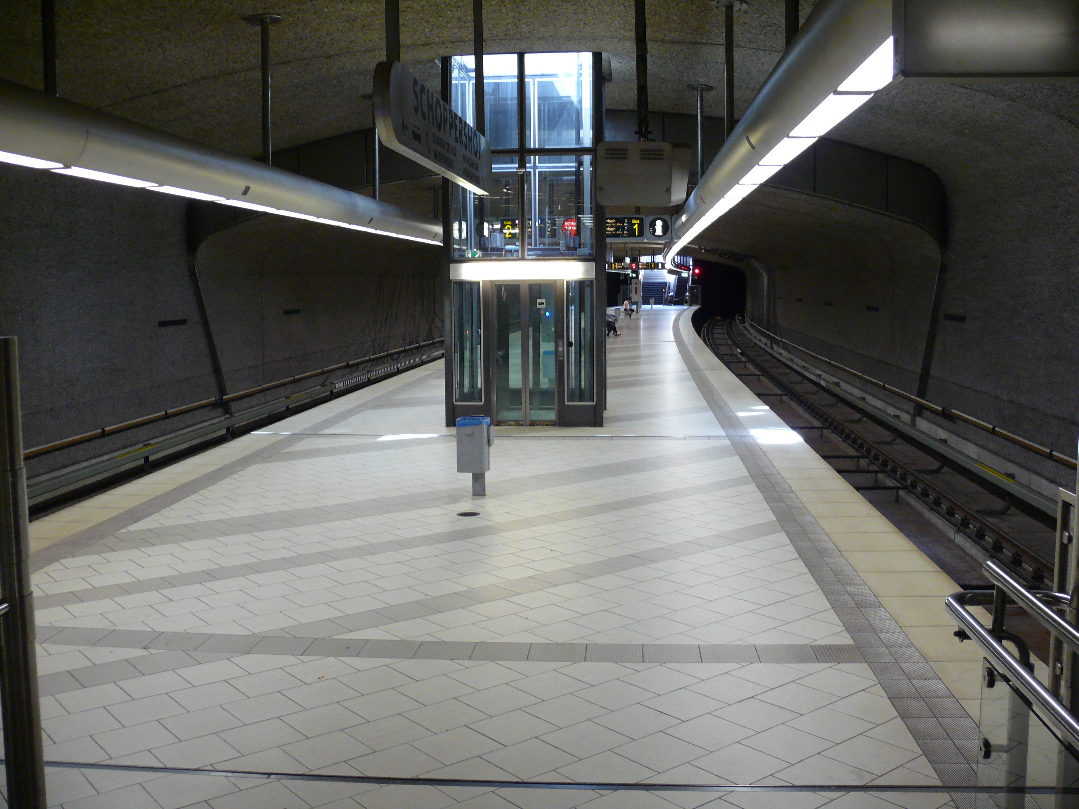 Bahnsteigebene am U-Bahnhof Schoppershof in Nürnberg.